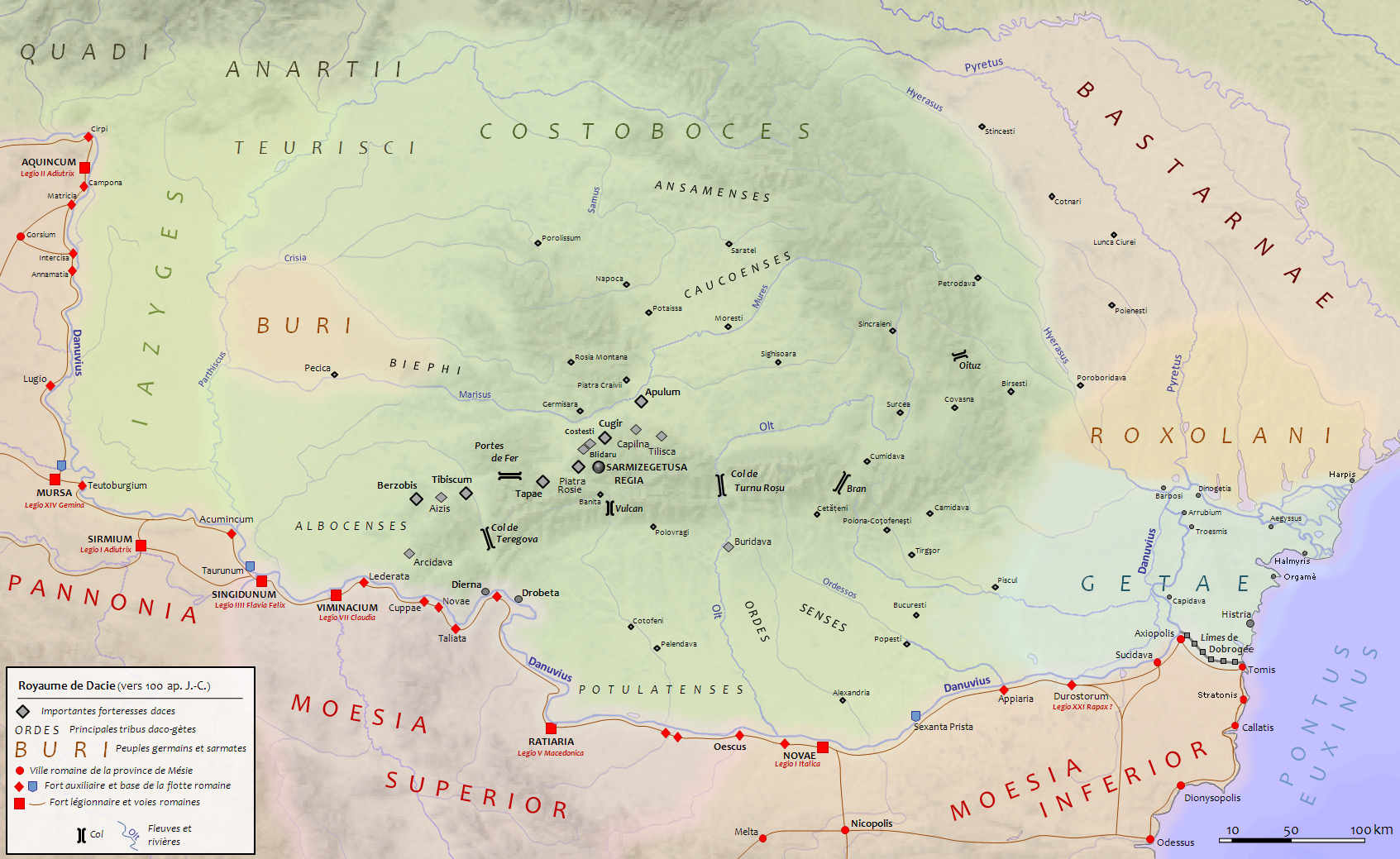 Carte de la Dacie vers 100, juste avant la première guerre dacique.